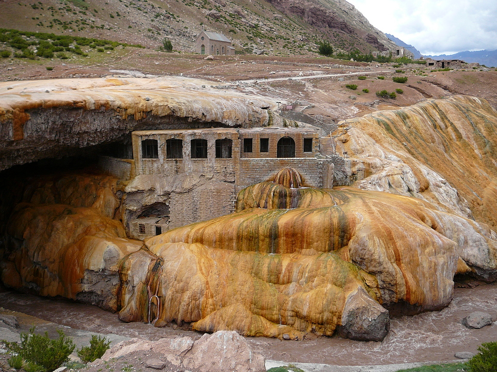 Puente del Inca, Mendoza. Argentina.